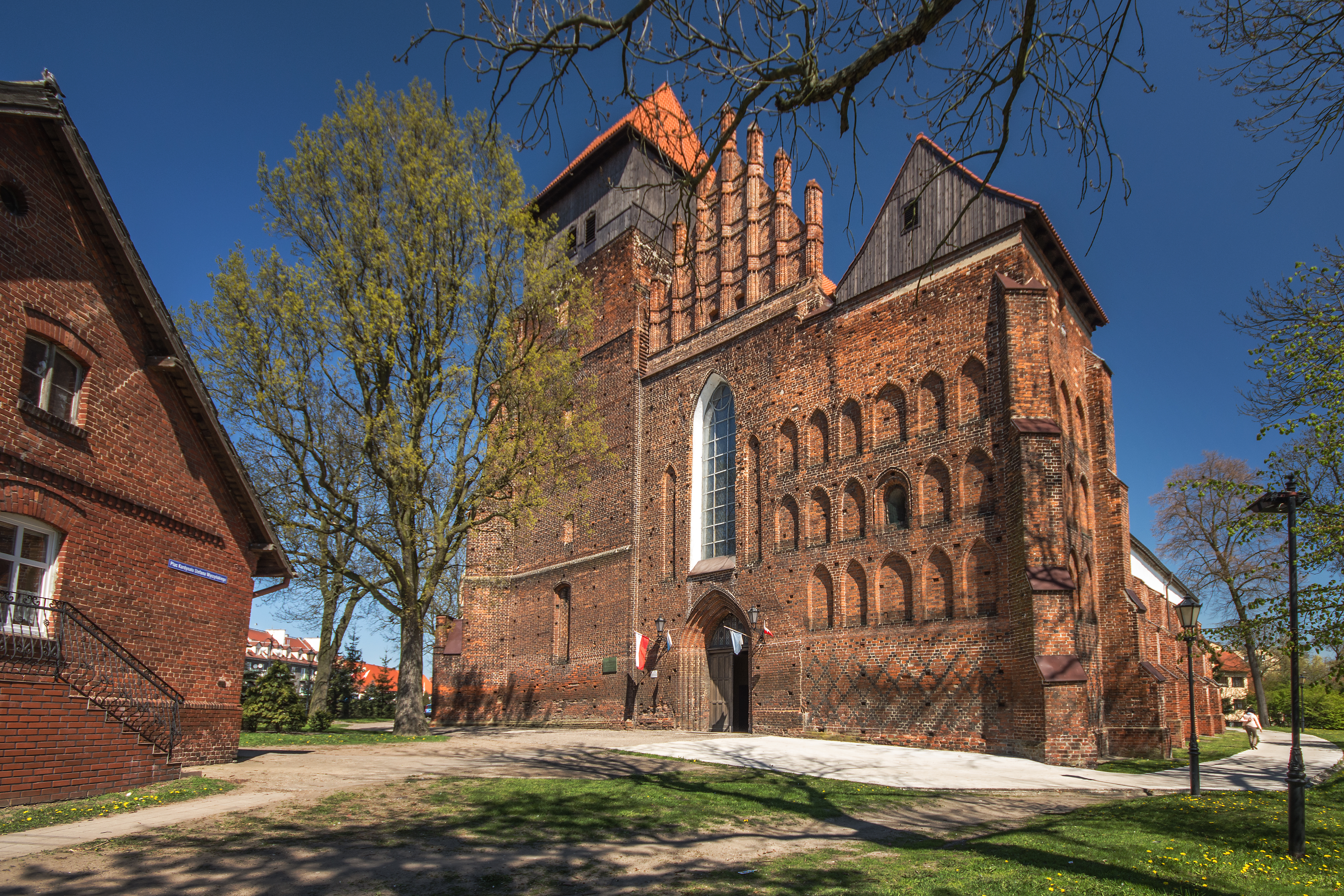 Nowy Staw, kościół par. p.w. św. Mateusza, XV, 1573-1574